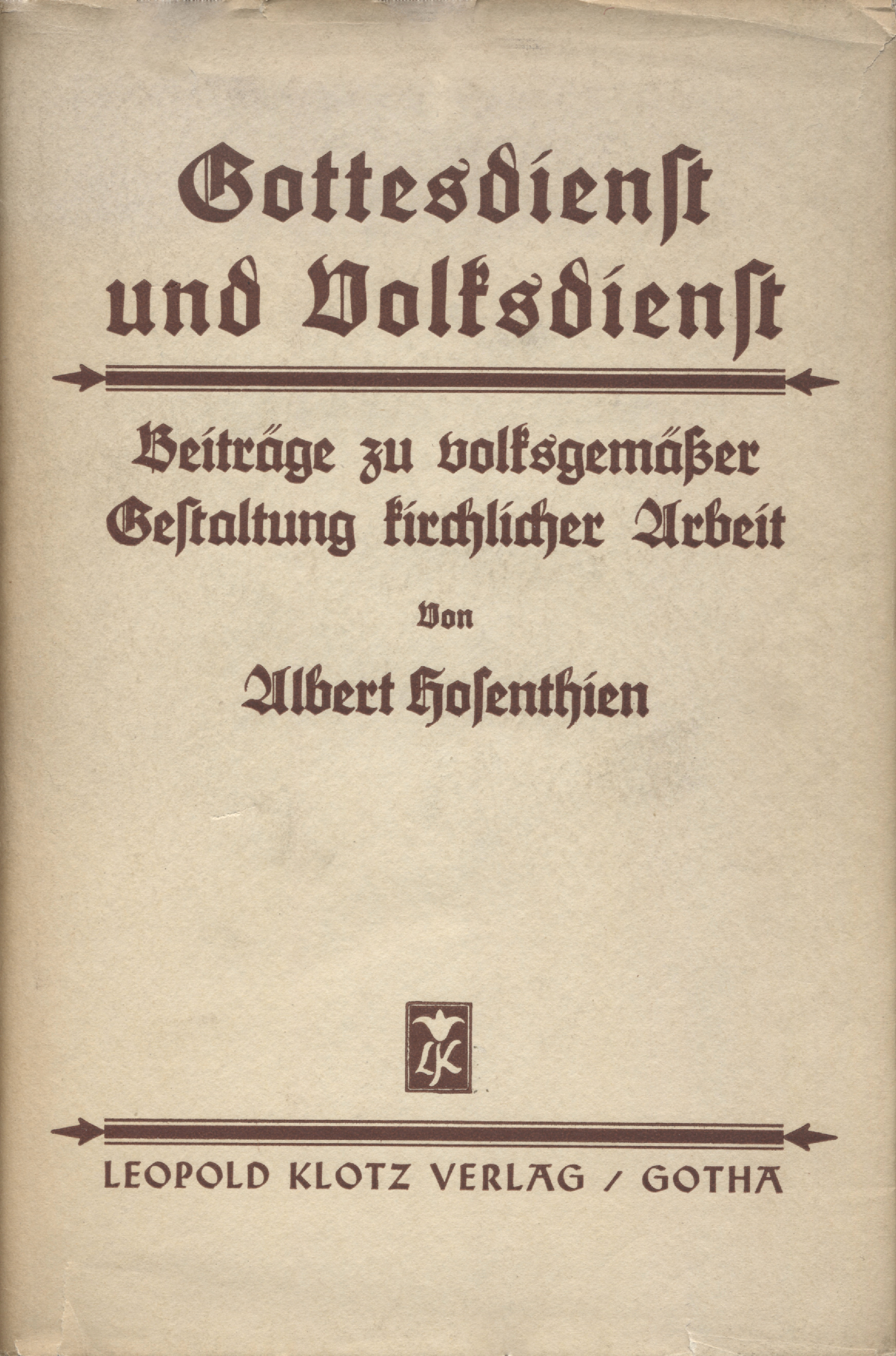 Vorderseite des Schutzumschlages des Buchs "Gottesdienst und Volksdienst" von Albert Hosenthien erschienen 1935 im Leopold Klotz Verlag Gotha